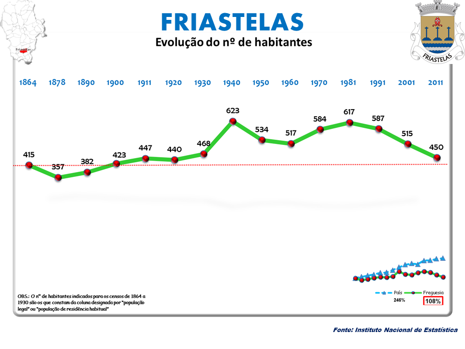 Cenos 1864/2011